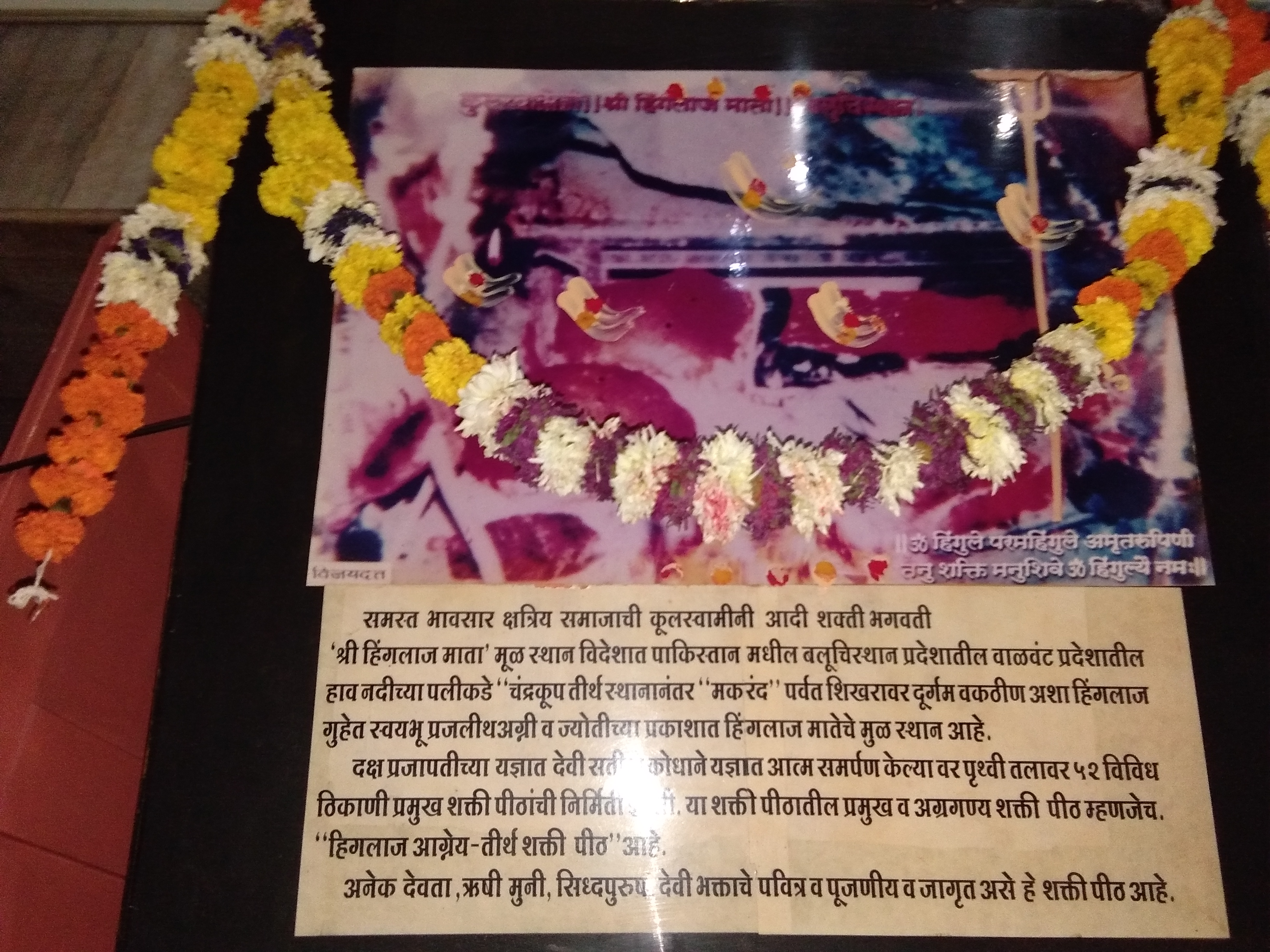 पोस्टर